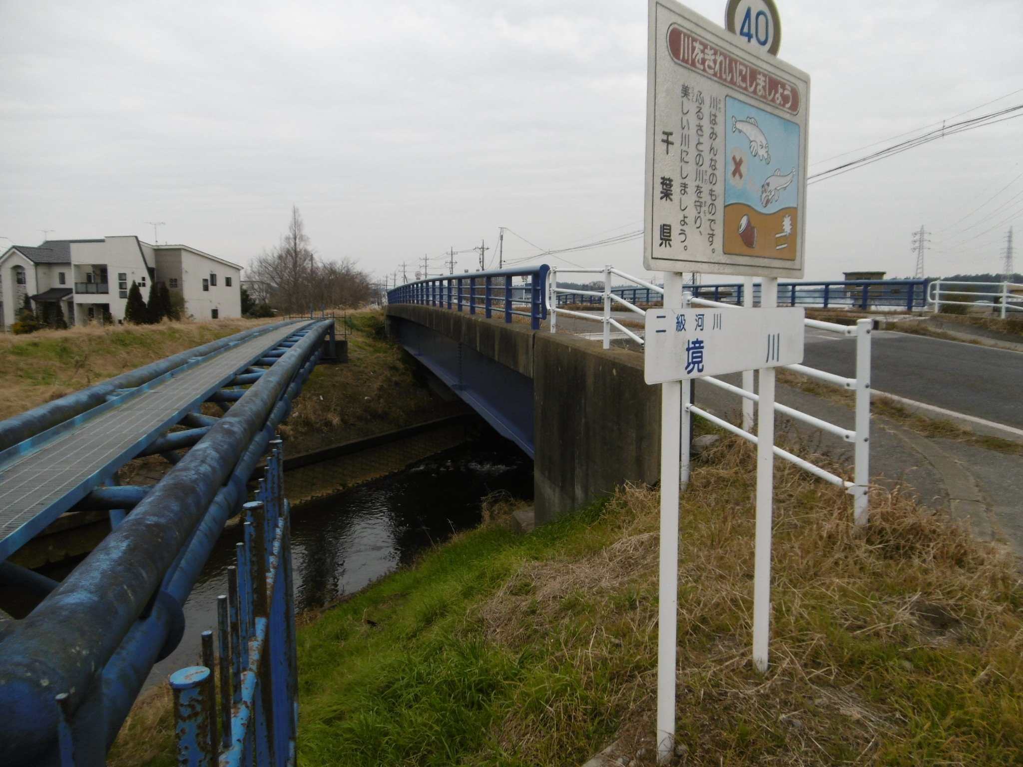 千葉県山武市のＪＲ成東駅付近を流れる二級河川の境川。隣の千葉県道121号成東鳴浜線がこの上を通る。